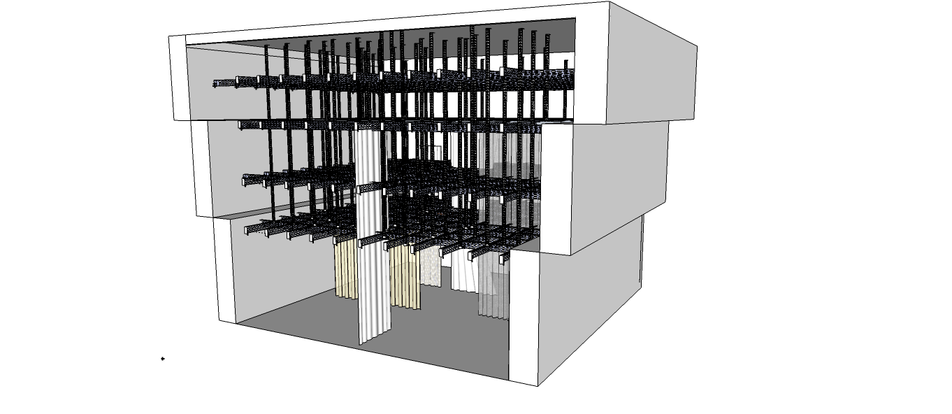 Vista prospettica del padiglione tessile, presentato all'interno della mostra delle produzioni d'arte alla XI edizione della Triennale di Milano